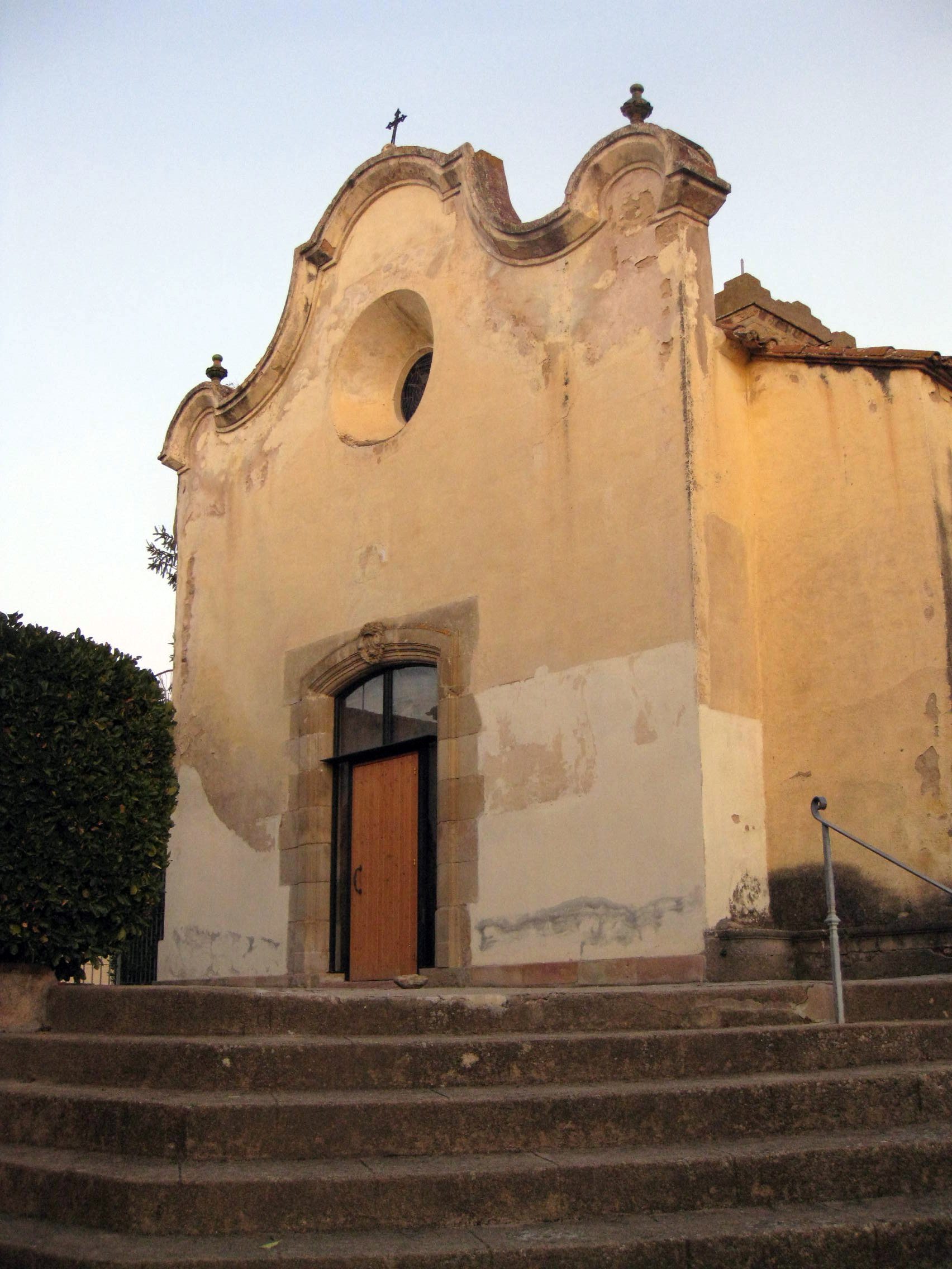 Església de Santa Maria de Martorelles Object location41° 31′ 10.91″ N, 2° 15′ 12.44″ E